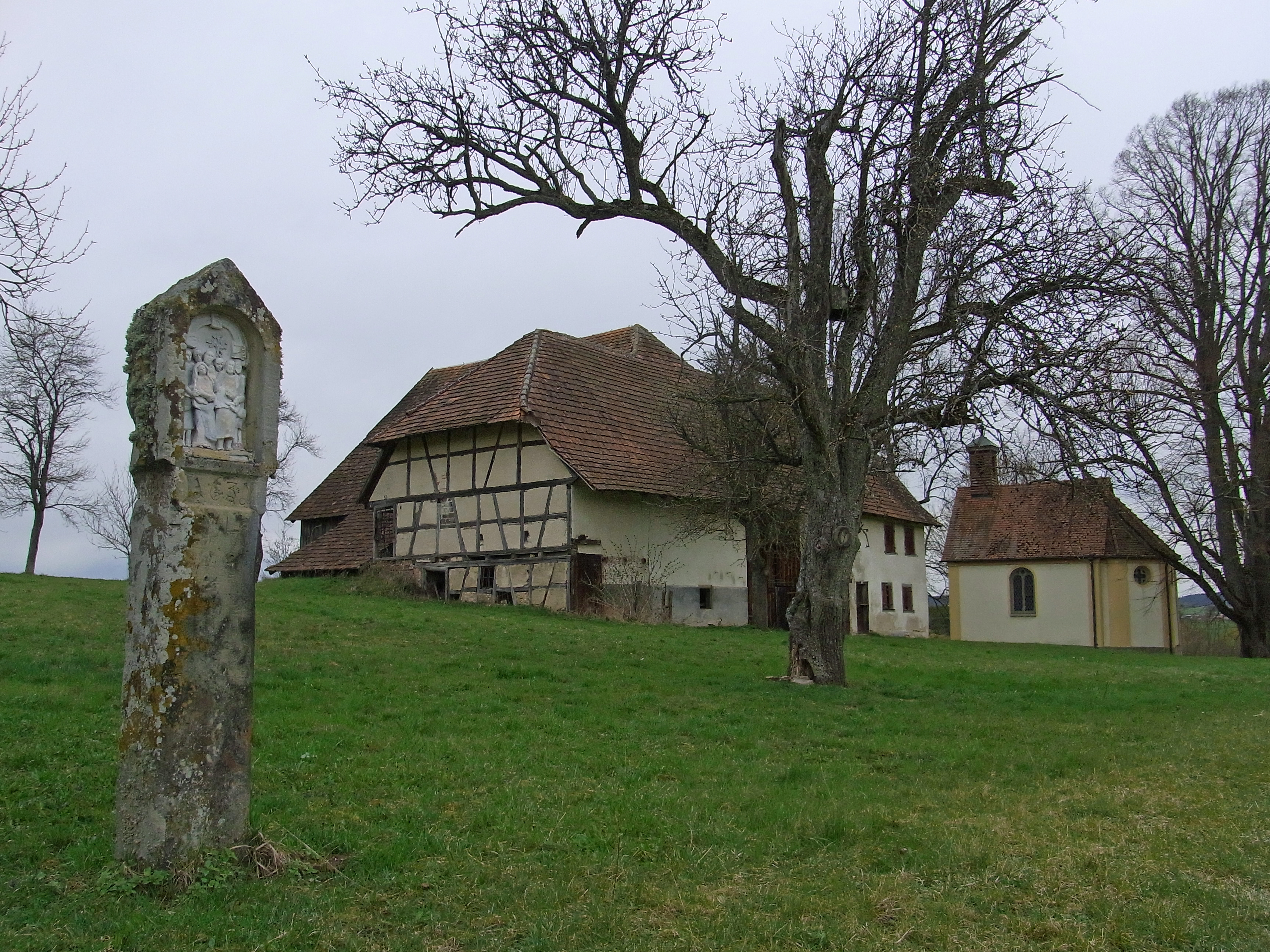 Dietingen - Irslingen - Mariahochheim